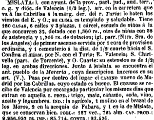 Datos de la villa de Mislata en 1848